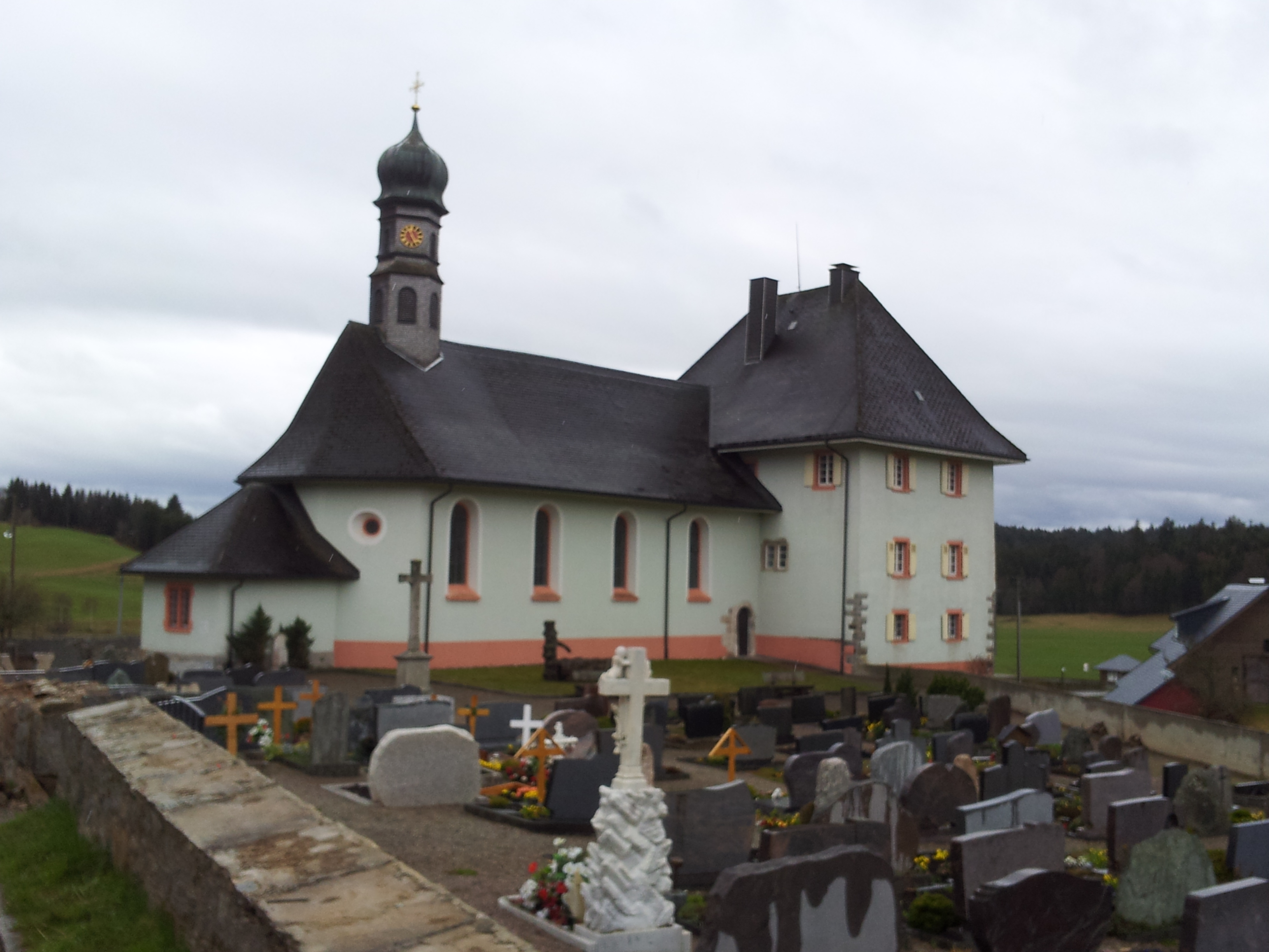 Einstiges Kloster "Neue Zelle" Ibach